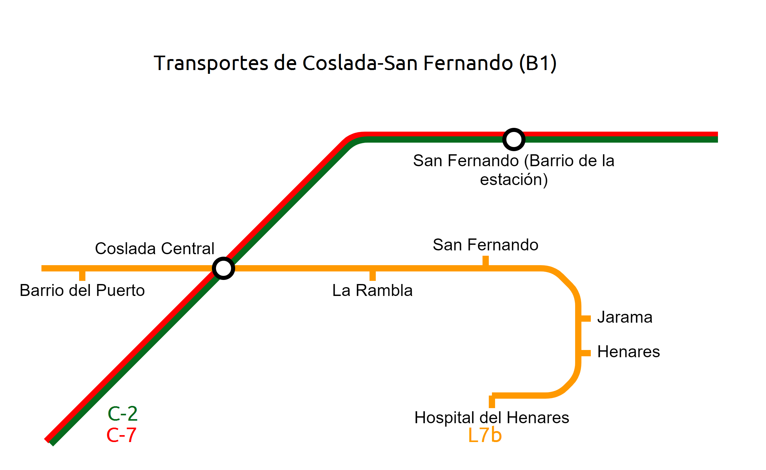 Mapa de los transportes de Cercanías y Metro de Madrid en los municipios de Coslada y San Fernando de Henares